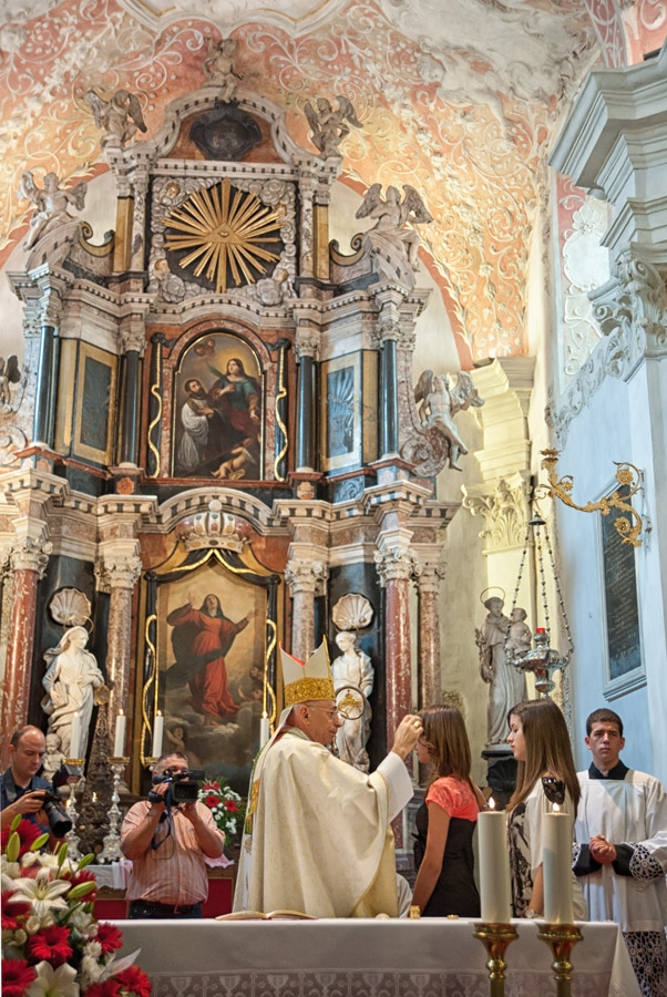 crkva Uznesenja Blažene Djevice Marije u Rijeci